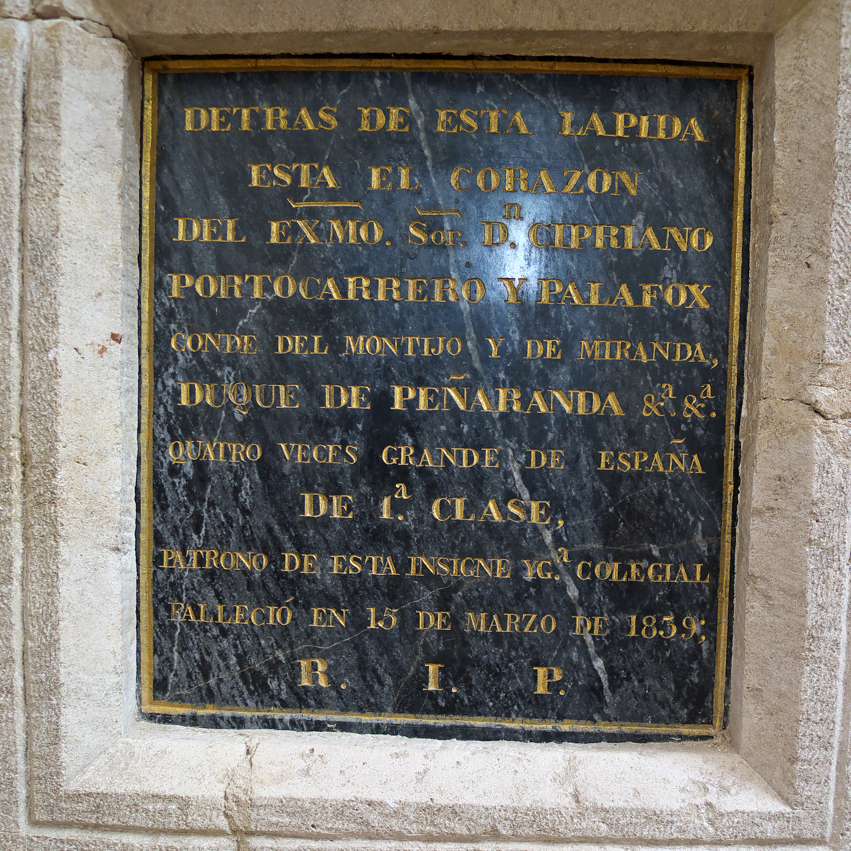 Colegiata de Santa Ana, Peñaranda de Duero. Lápida funeraria de Cipriano Palafox y Portocarrero (†1839), esposo de María Manuela Kirkapatrick, XIII Duque de Peñaranda de Duero y XXV señor de Moguer.